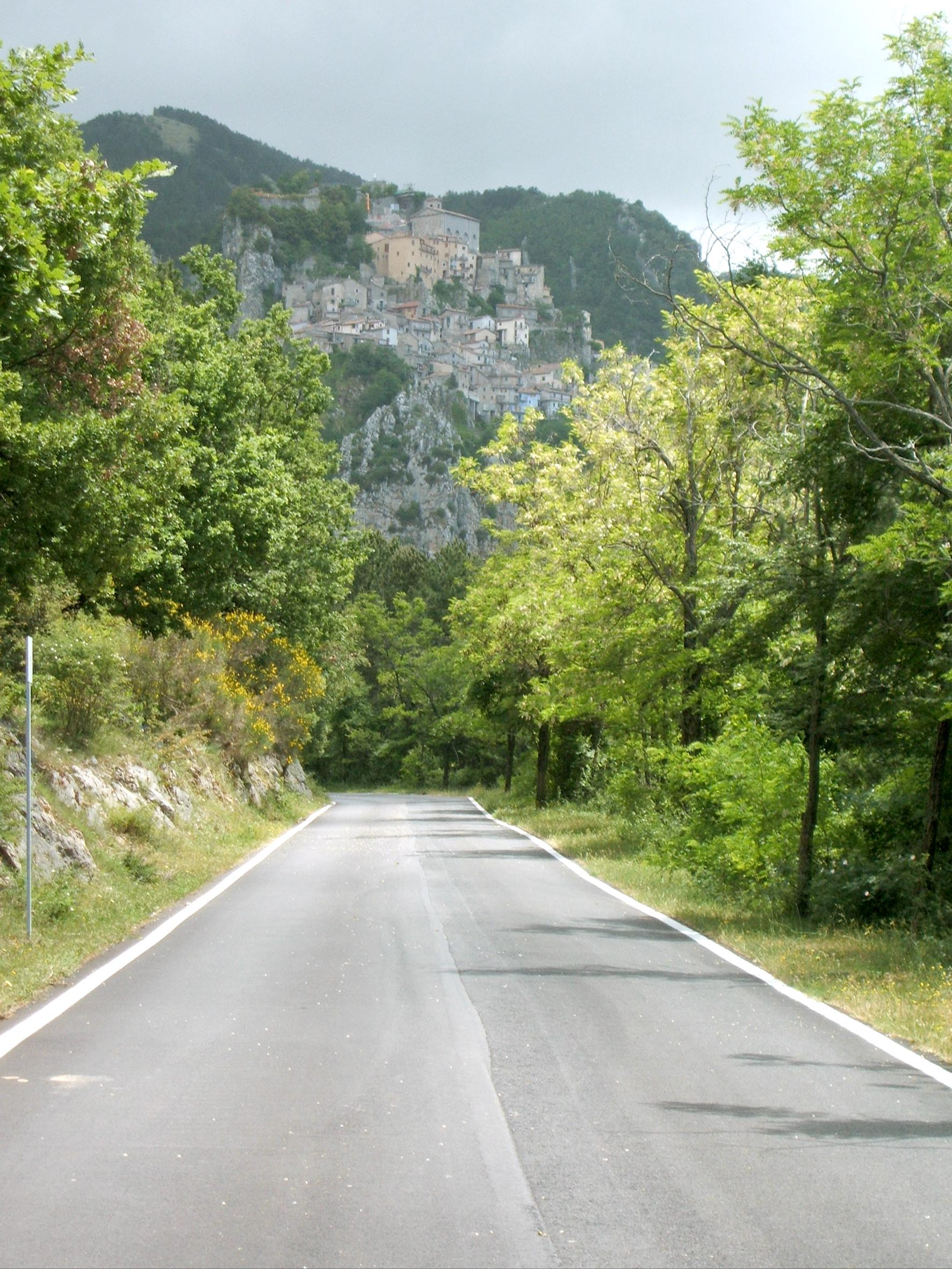 Cervara di Roma